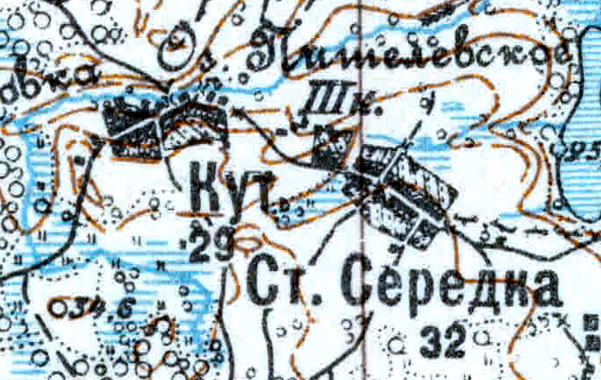 Топографическая карта Ленинградской области, квадрат VIc-28 (Луга), деревня Старая Серёдка